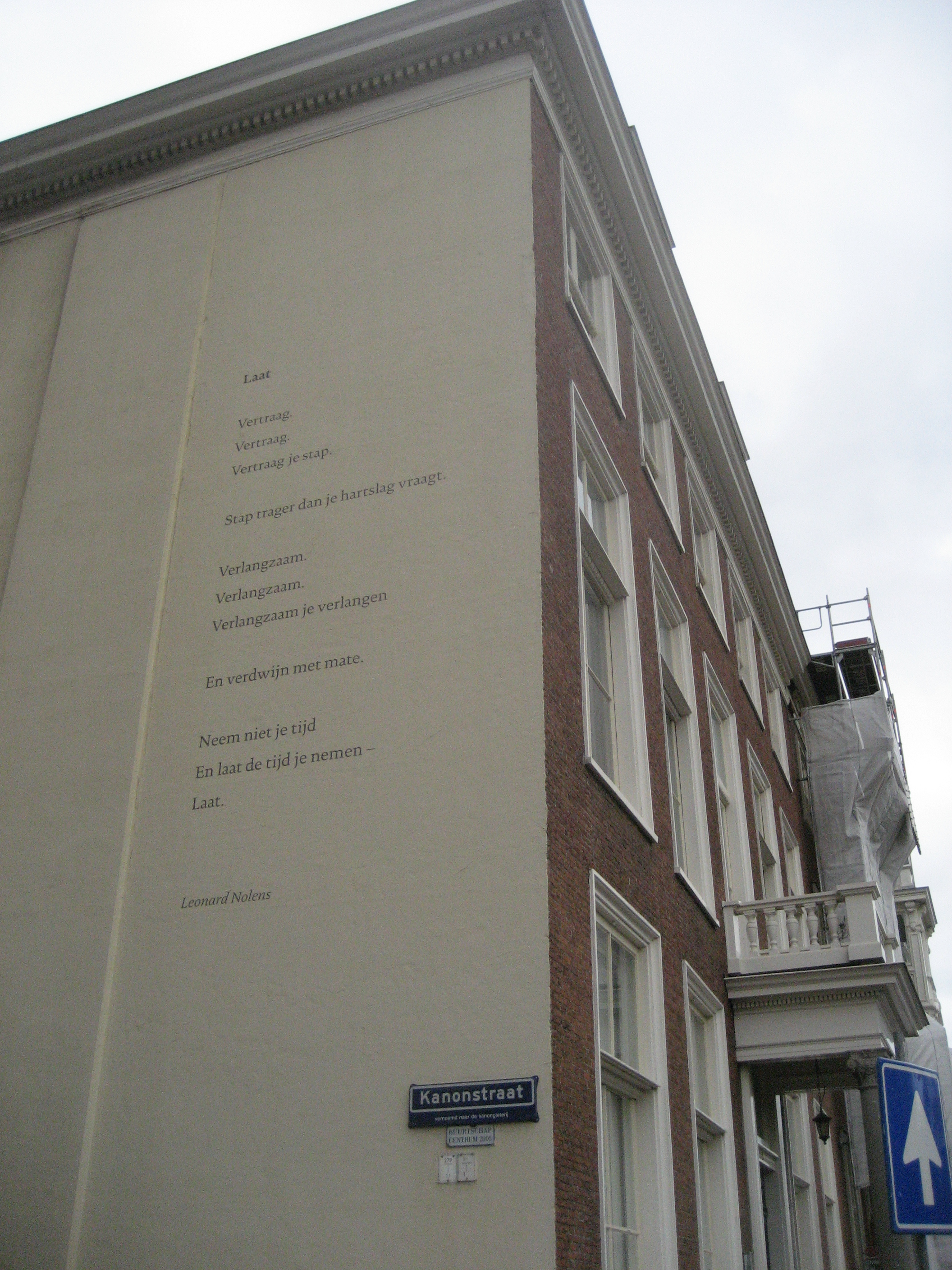 Muurgedicht "Laat" van Leonard Nolens, in de Kanonstraat in Den Haag (Nederland)